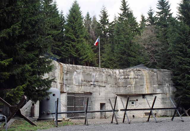 Vchodový objekt K-S 22a Krok, dělostřelecká tvrz Bouda